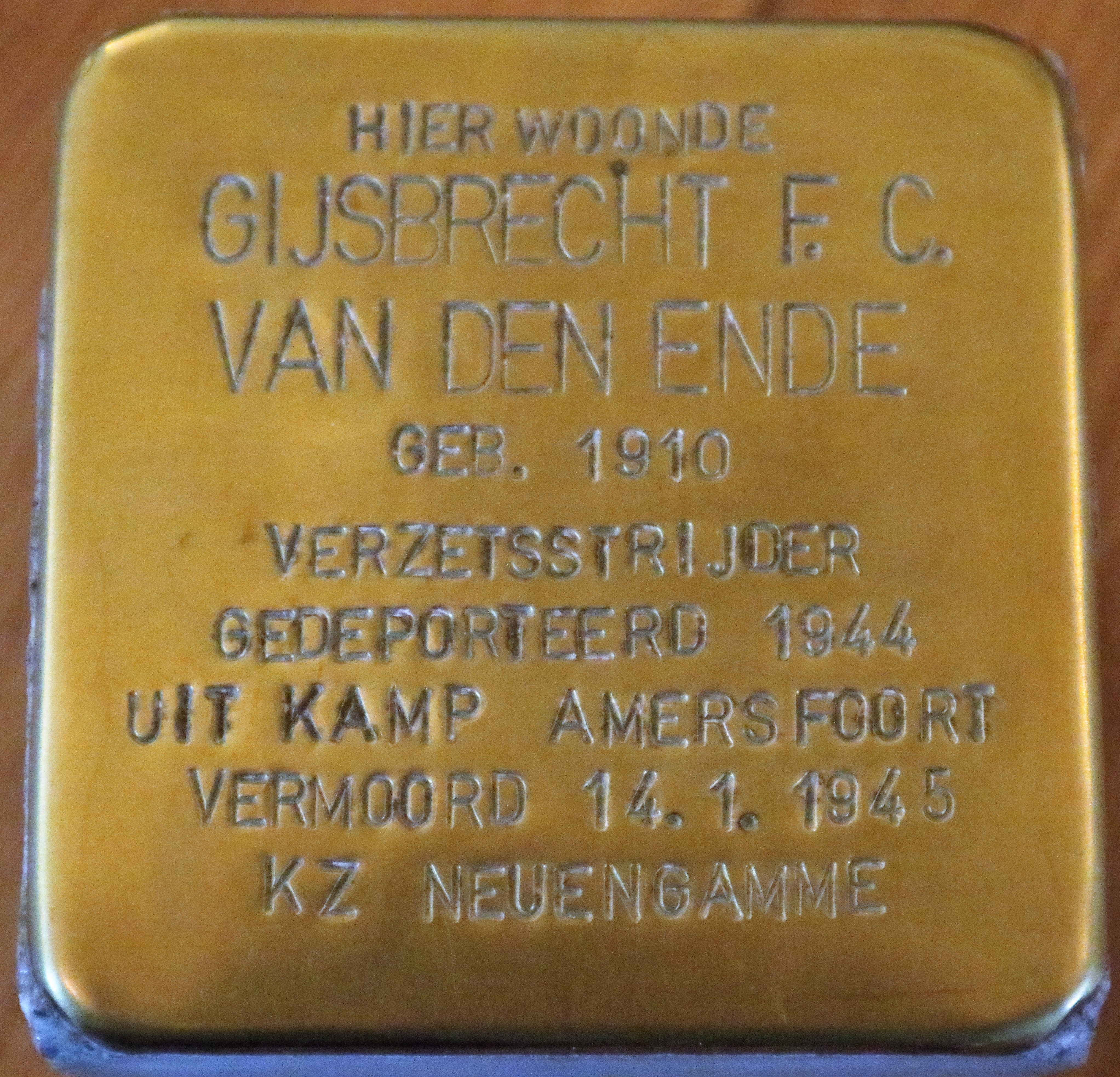 Stolperstein voor Gijs vd Ende, 18 april 2018